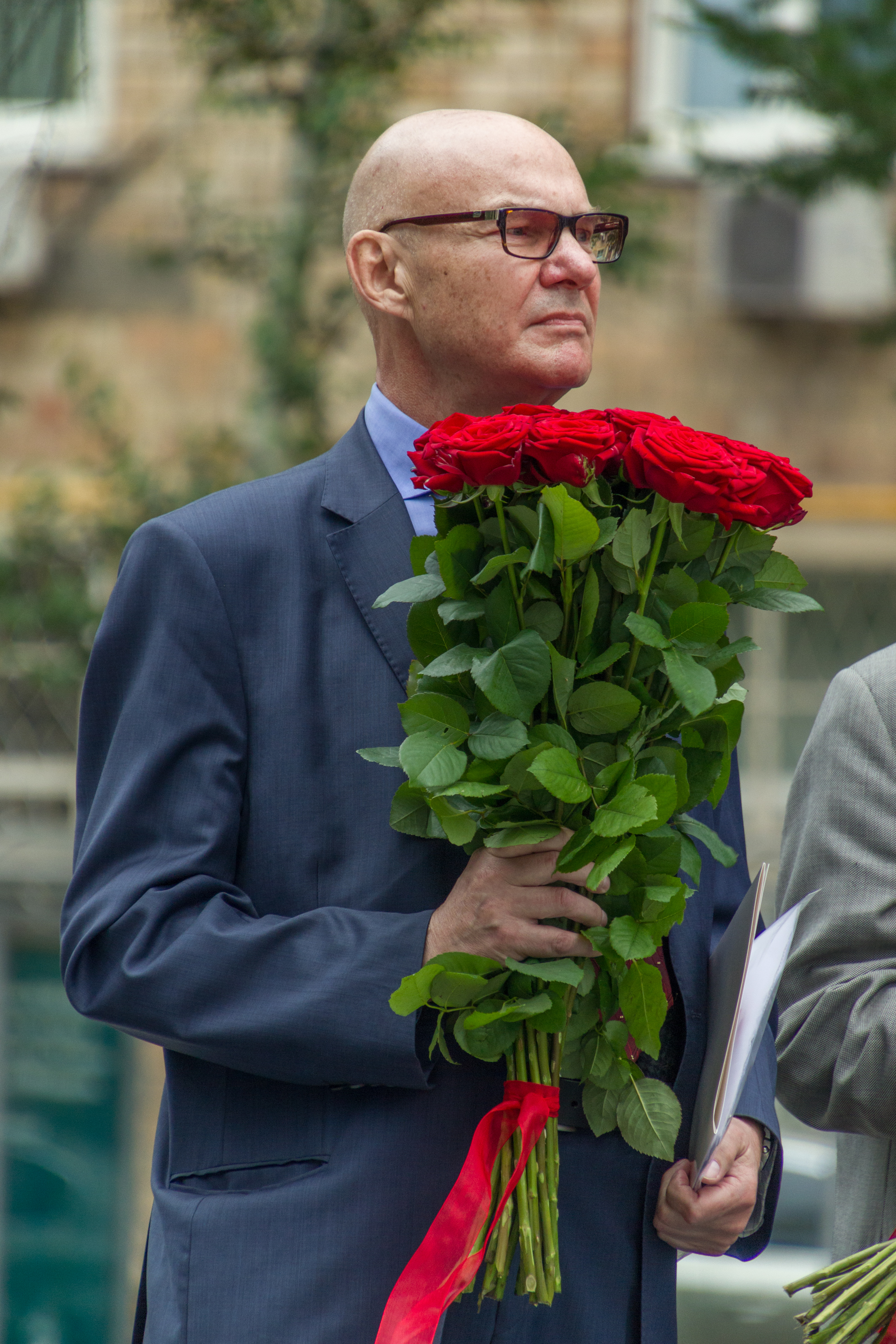 Академик РАН И.А. Щербаков на открытии памятника А.М. Прохорову 9.07.2015.